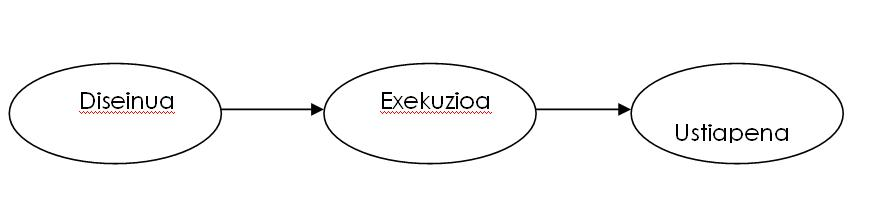 Sare proiektu baten hiru etapa edo urrats nagusiak